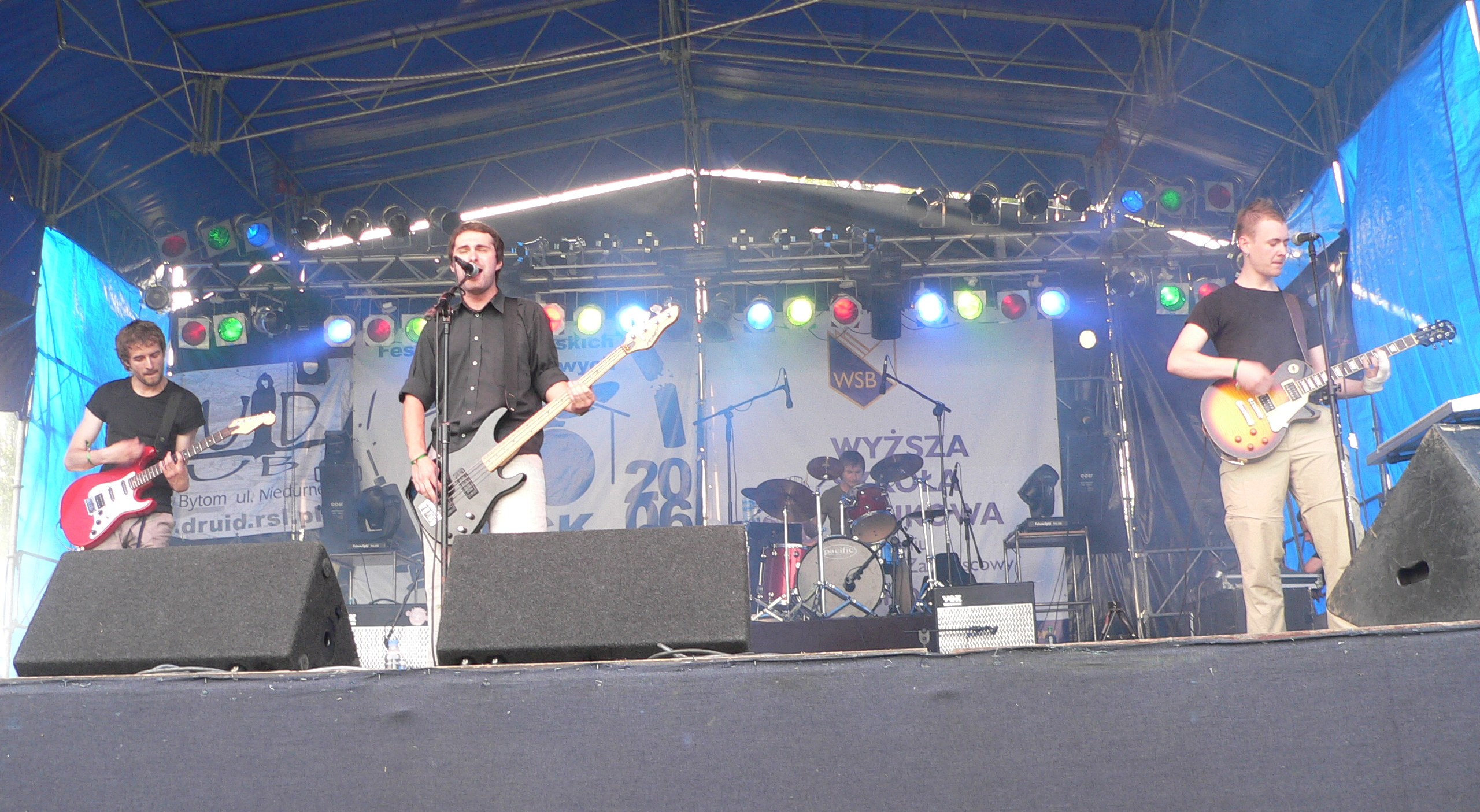 Беларуская (тарашкевіца): Гурт Jitters сьпявае на фэстывалі “Rock bez Igły” у 2006 годзе.